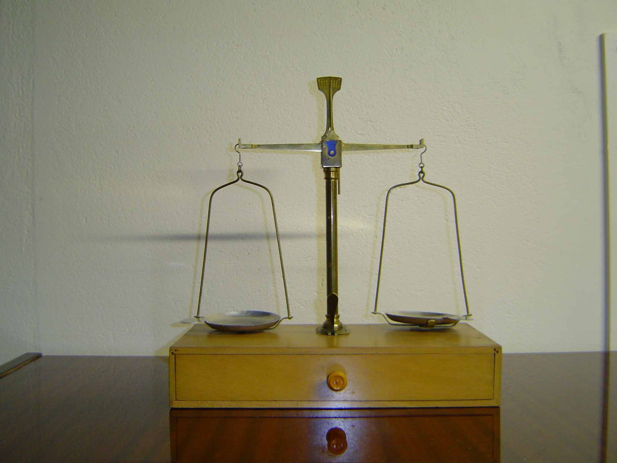 Phot personnelle de ma collection